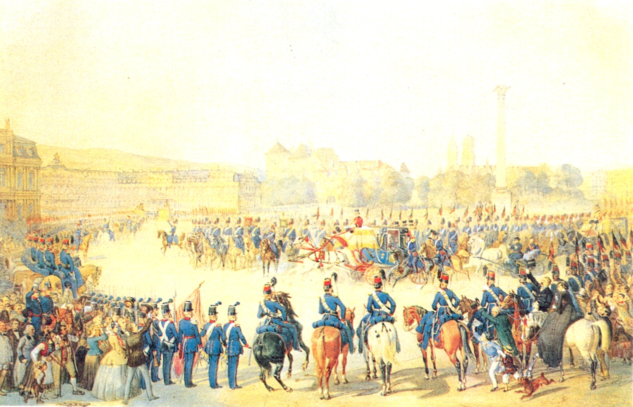 Auffahrt von Kaiser Napoleon III., Zar Alexander II., König Wilhelm I. von Württemberg und Königin Sophie von Holland (Tochter Wilhelms I.) vor dem Neuen Schloss in Stuttgart am 25. September 1857 (Aquarell)